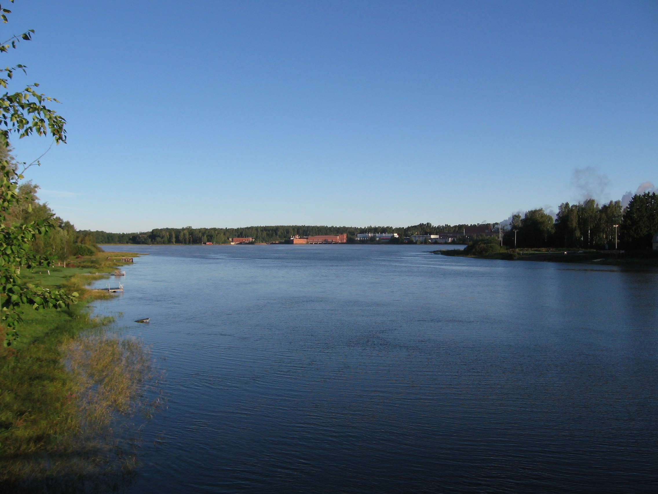 Kymijoen Anjalanlahti nykyisessä Kouvolassa kuvattuna Anjalan ja Inkeroisten väliseltä sillalta.